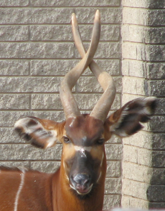 Tragelaphus eurycerus Isaaci (Bongo)